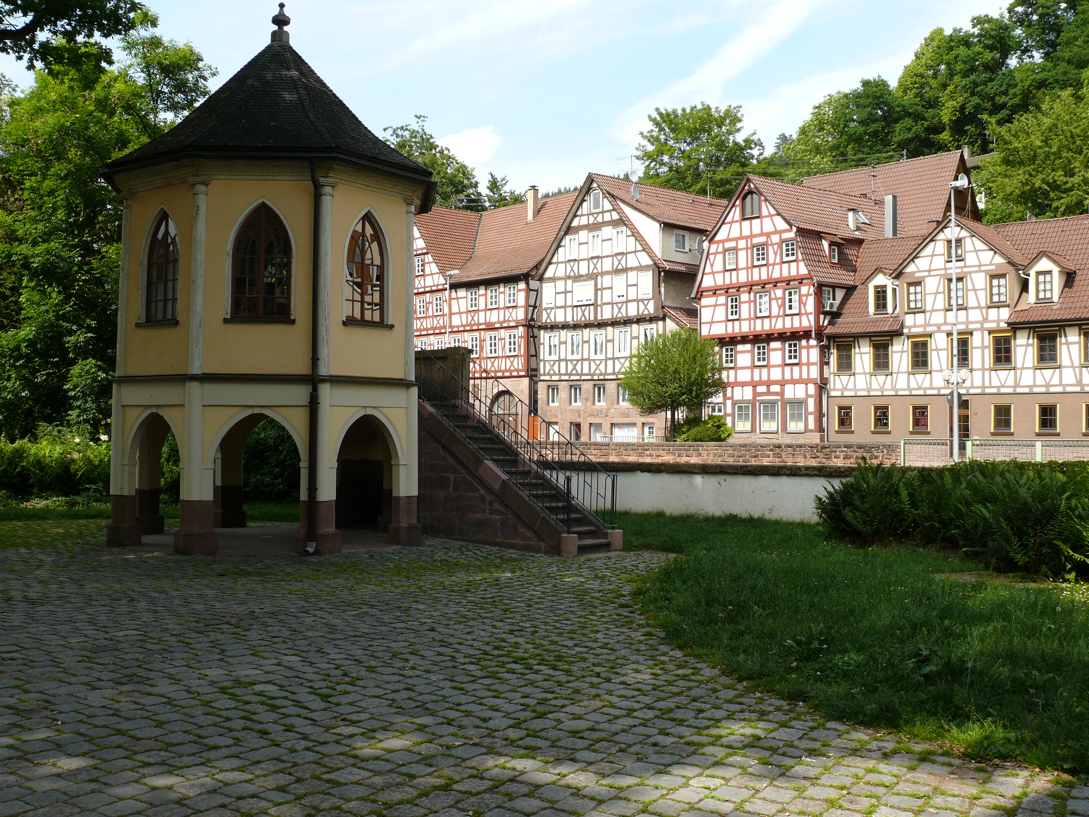 Pavillon im Park und Fachwerkhäuser am Ufer der Nagold gegenüber.